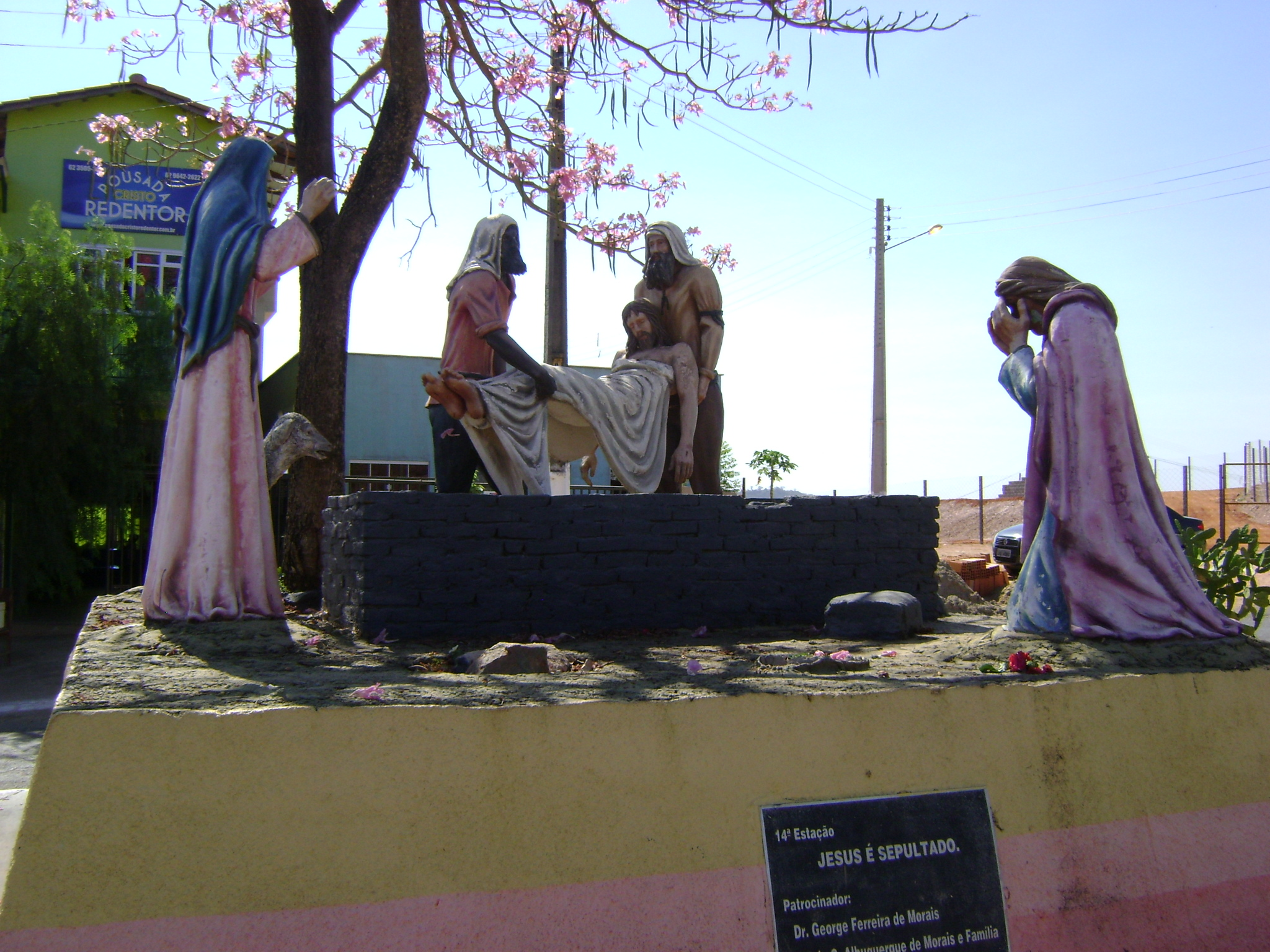 Estátua da Via Sacra em Trindade, Goiás, Brasil.